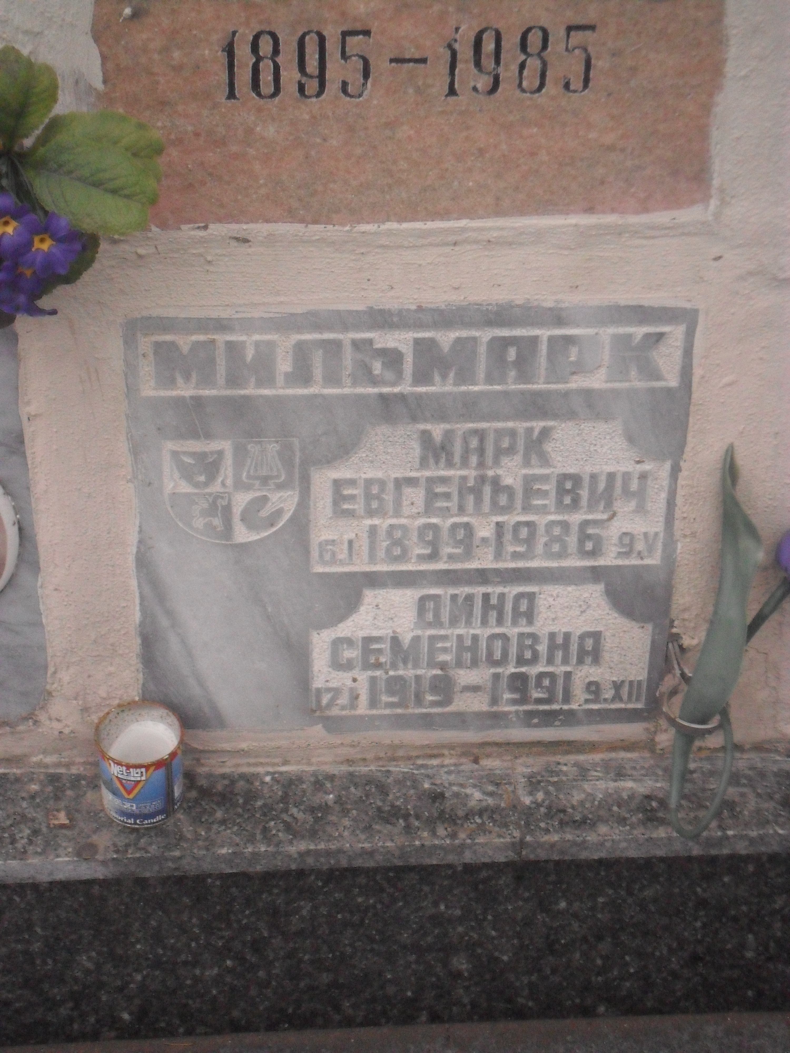 Плита колумбария артиста Марка Мильмарка на Ваганьковском кладбище.